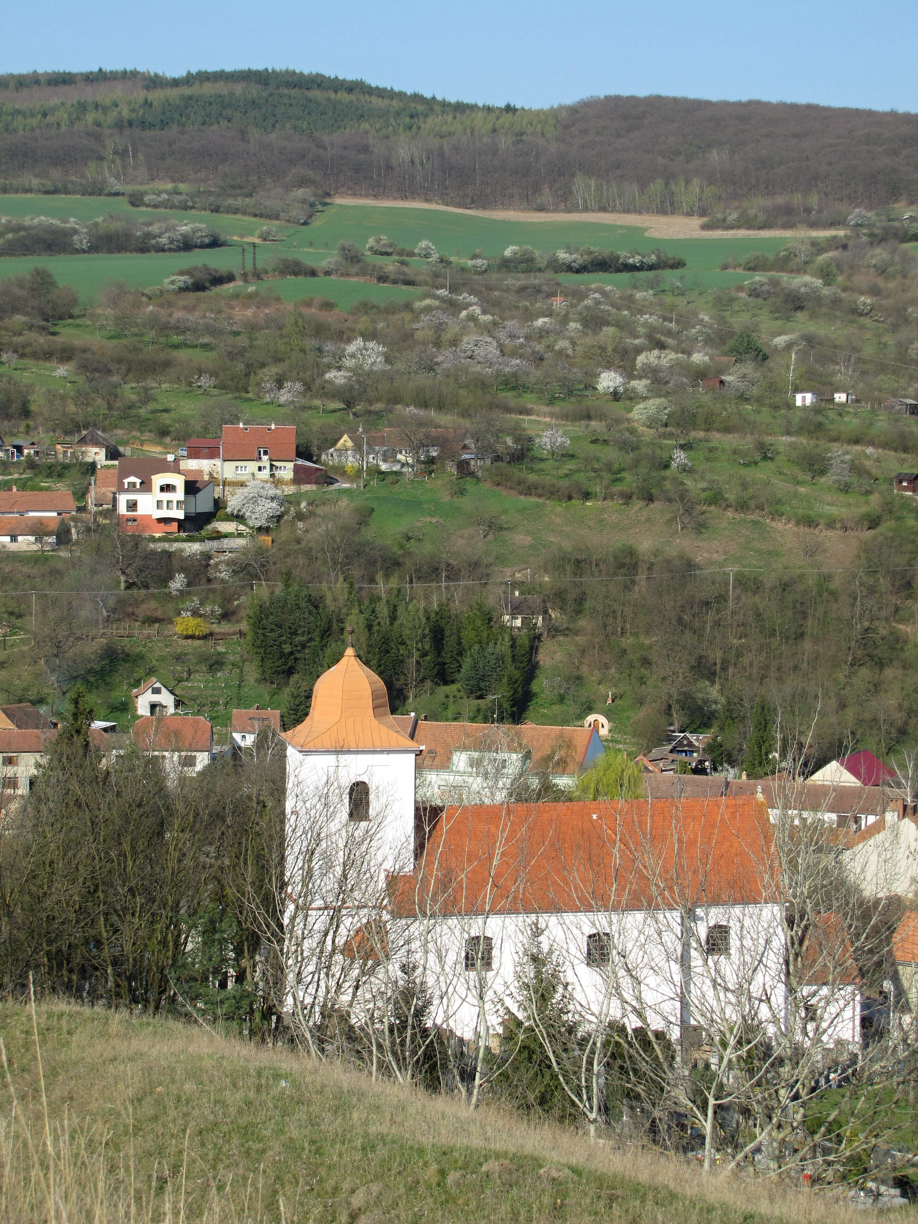 Kostel svatého Filipa a Jakuba v Bohuslavicích u Kyjova